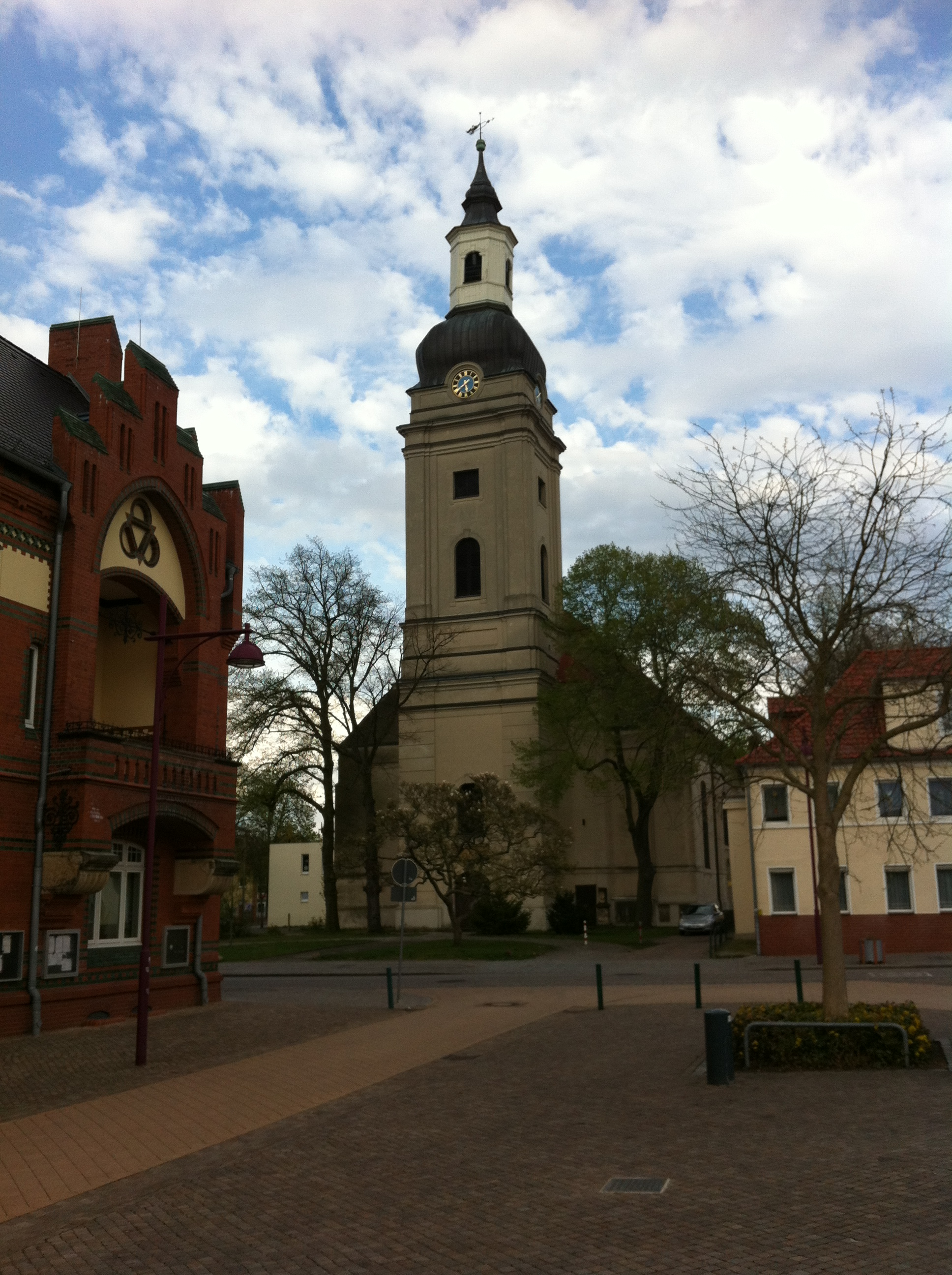 Stadtkirche St. Trinitatis (Genthin) vom Marktplatz gesehen (hochkant)